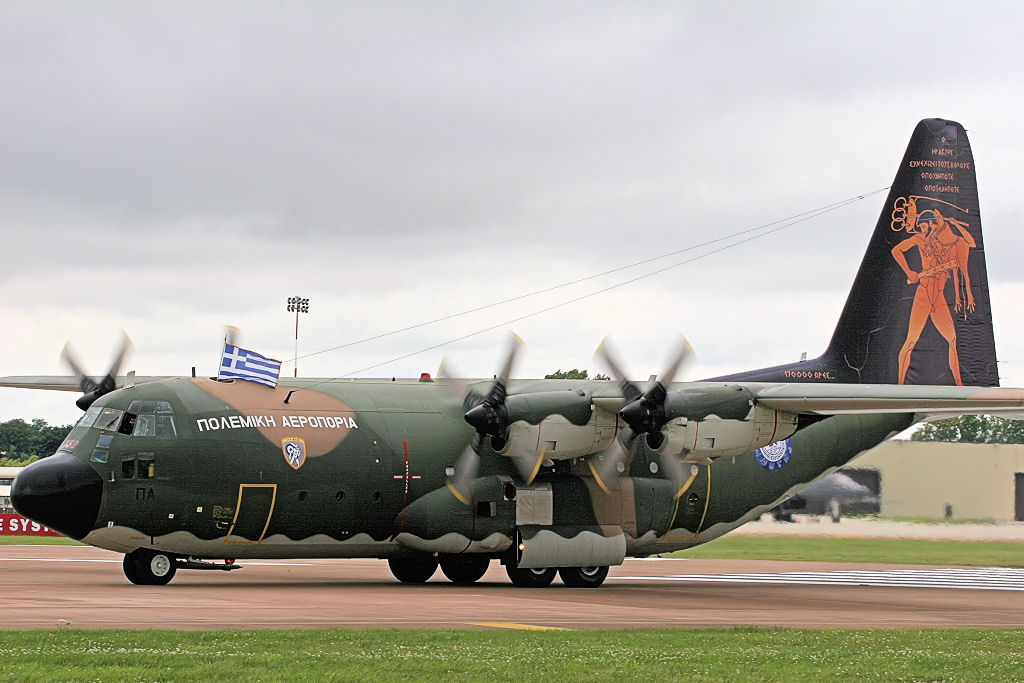 C130 Hercules - RIAT 2007